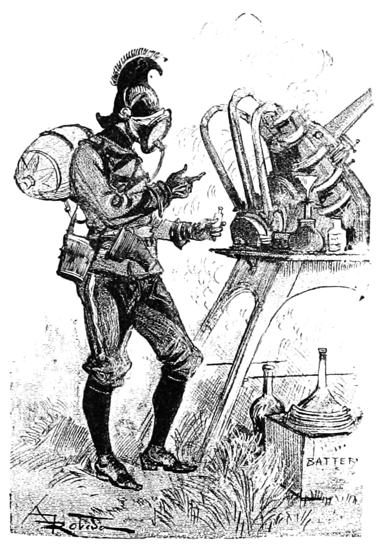 Albert Rodida - La Vie Electrique